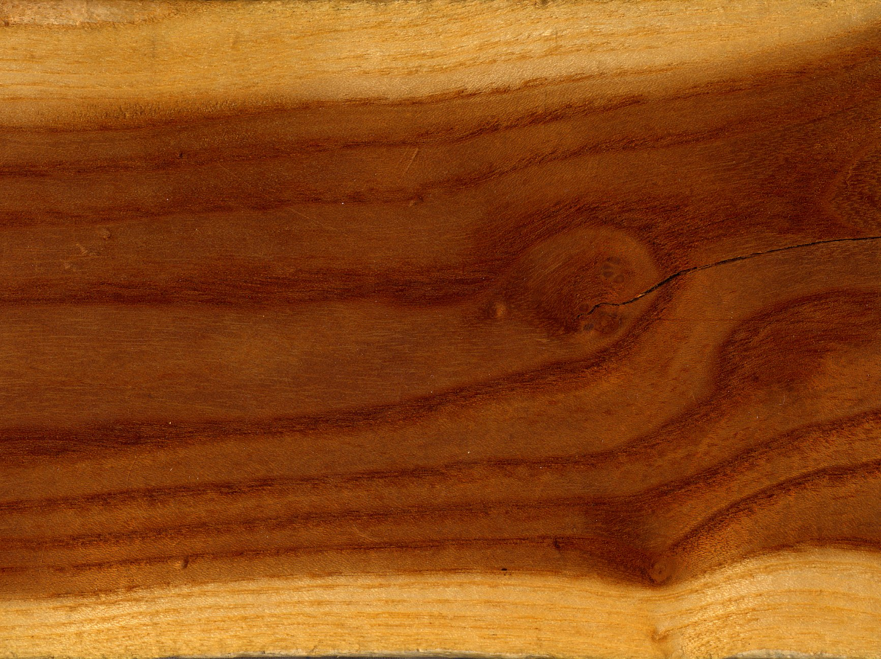 Morus alba, przekrój styczny przez drewno morwy białej